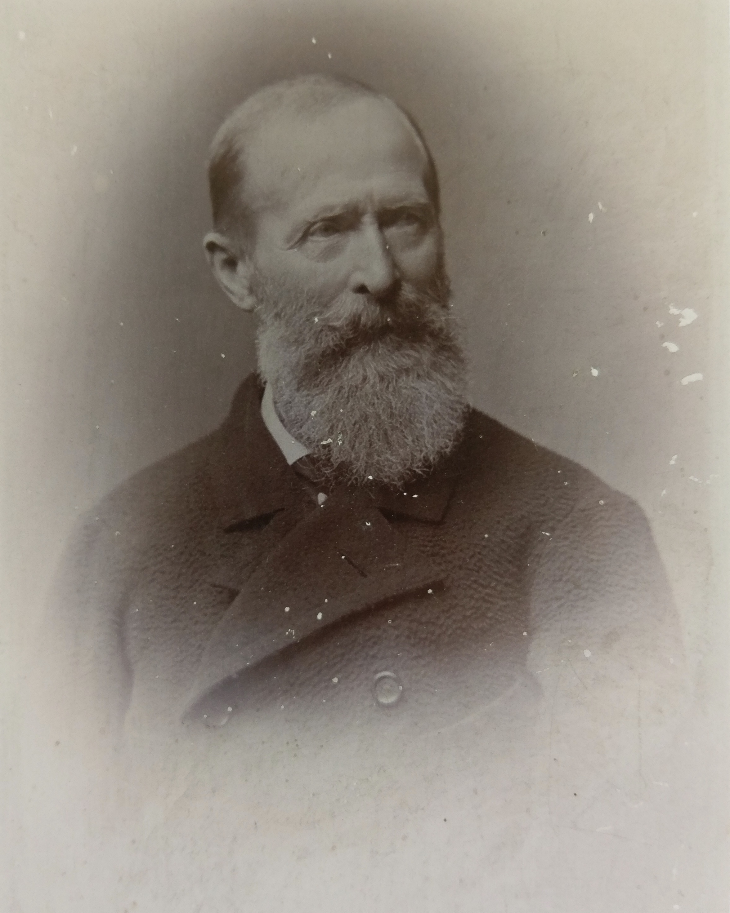 Georg Graf von Werthern-Beichlingen, u.a. preußischer Gesandter im Königreich Bayern 1867-1888 Foto durch „Atelier Elvira, Hofphotographische Anstalt München-Augsburg“